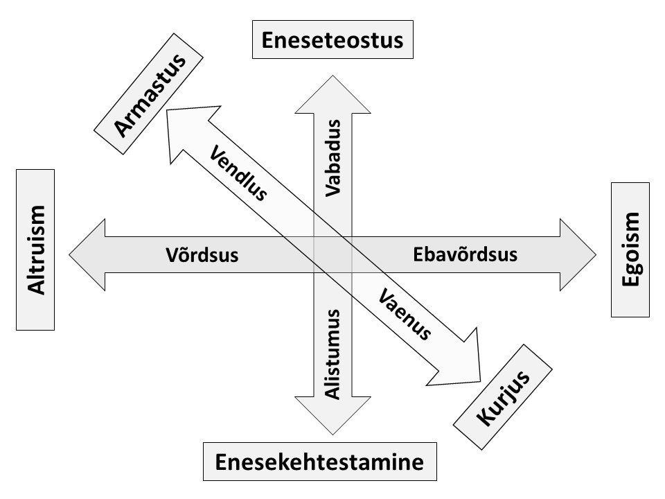 Kolm dimensiooni sotsiaalse korra mudelis